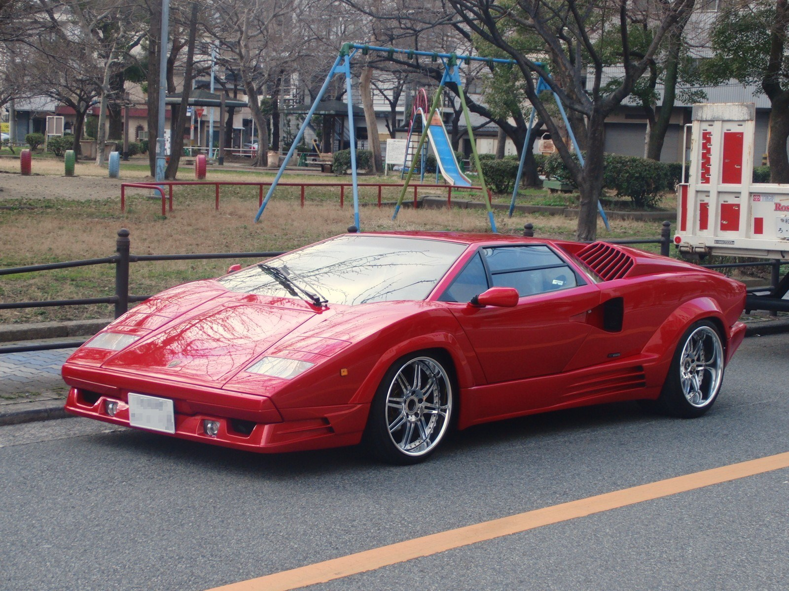 ランボルギーニ・カウンタック25thアニバーサリーを撮影